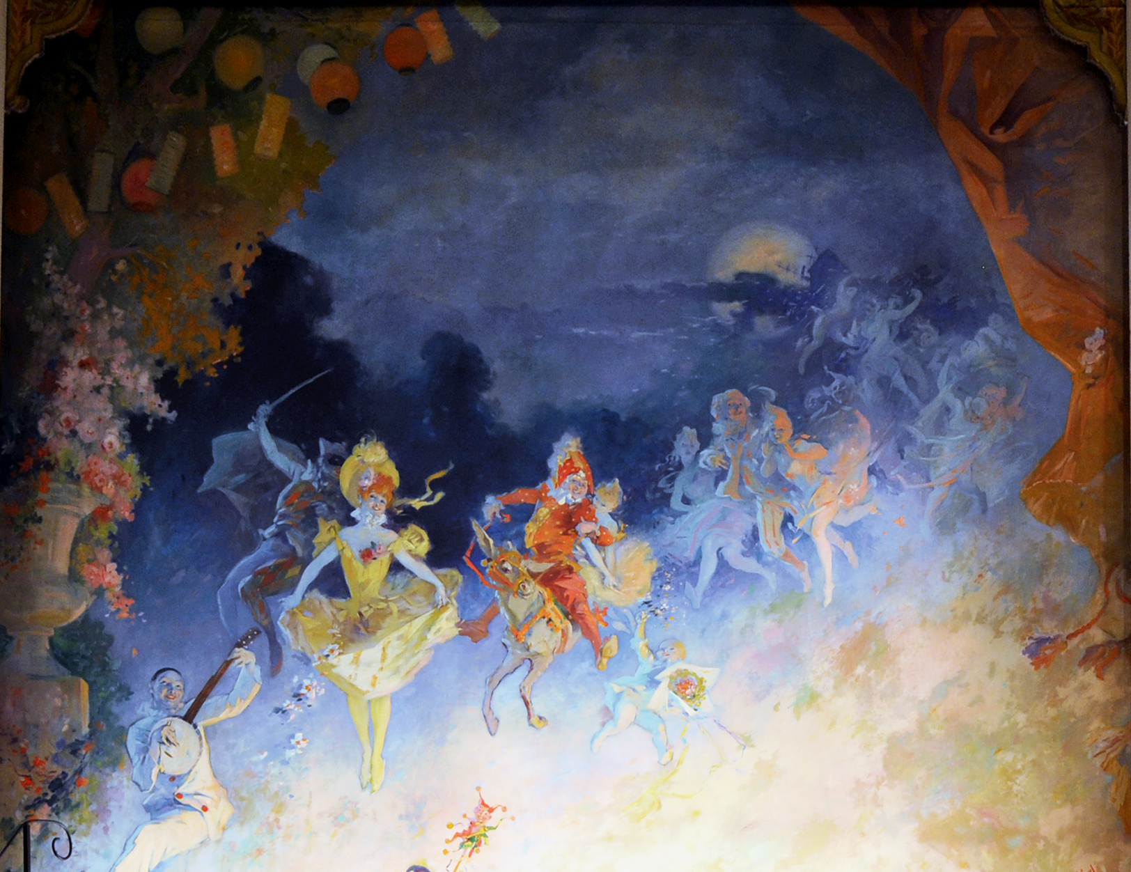 Le rideau de scène du théâtre du Musée Grévin, peint par Jules Chéret en 1900.